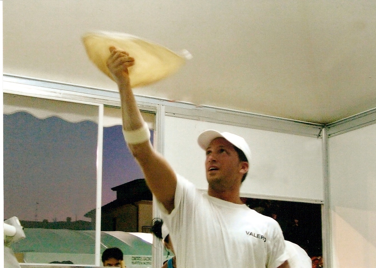 Pizzaiolo Acrobatico